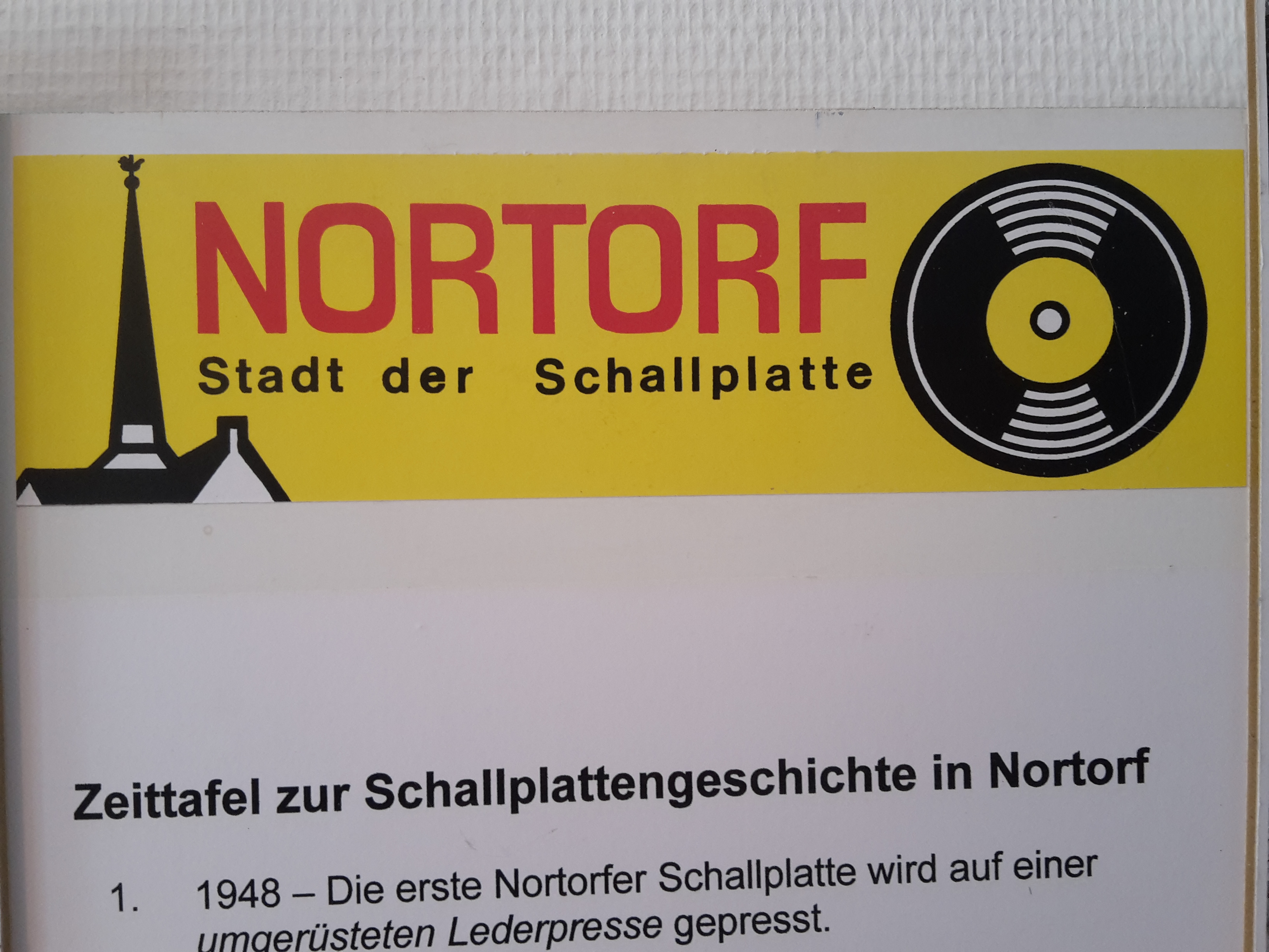 Museum Nortorf Ausstellung